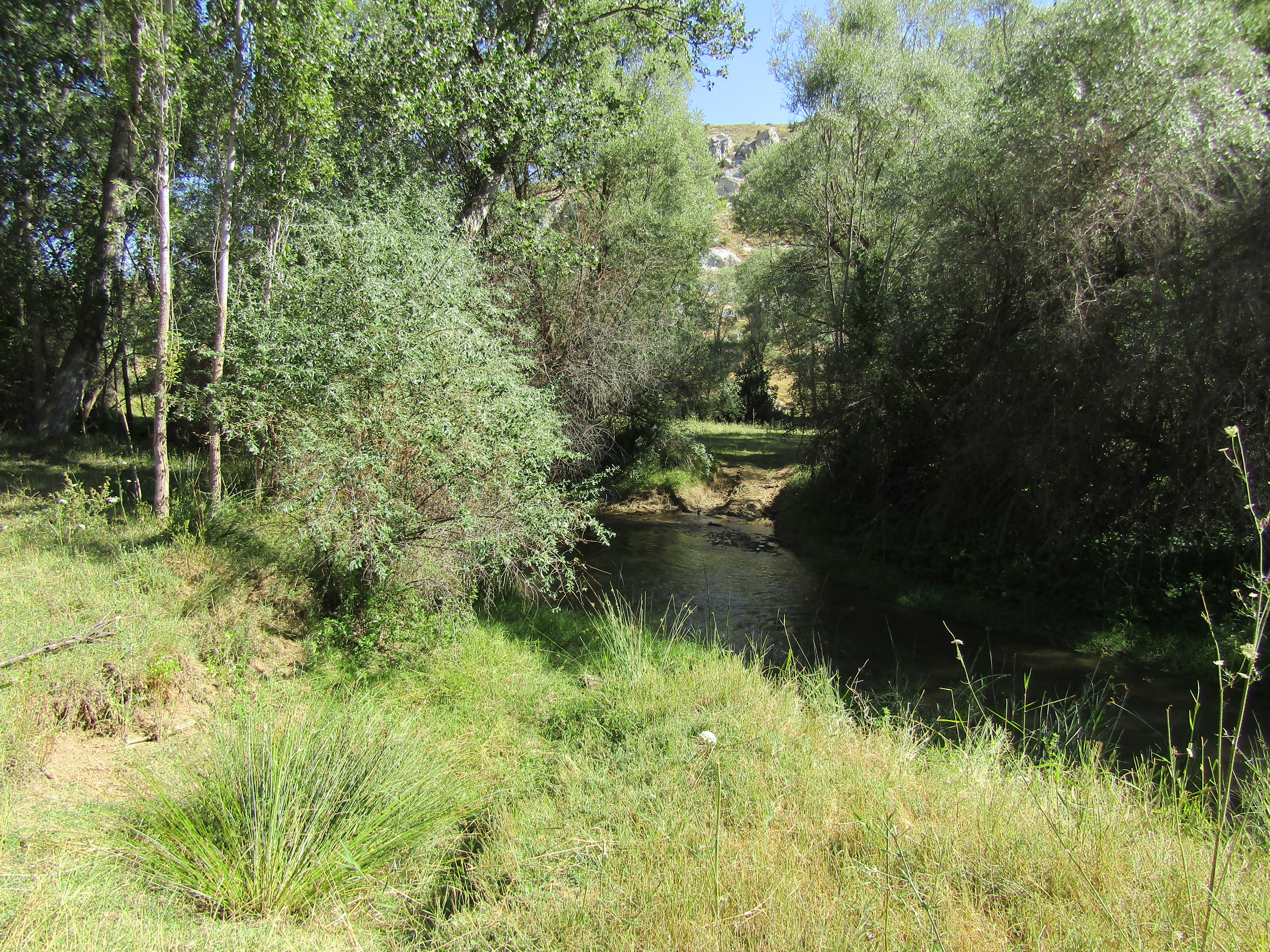 Kaldırak Özü